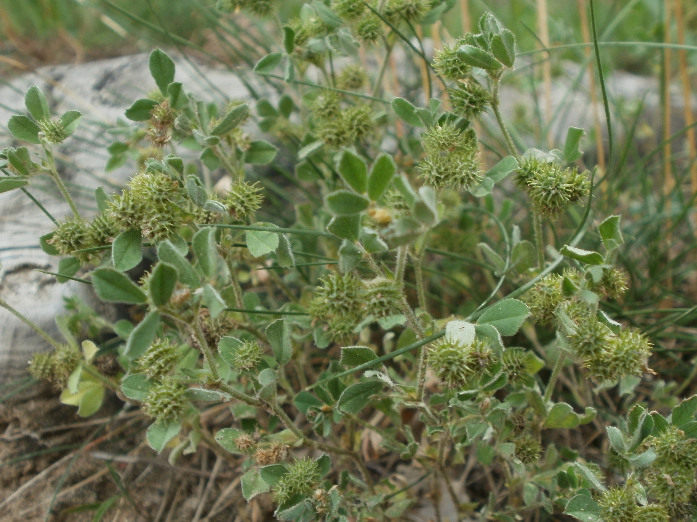 Zwerg-Schneckenklee (Medicago minima) auf dem Dreieichenbuckel (Oftersheimer Dünen)